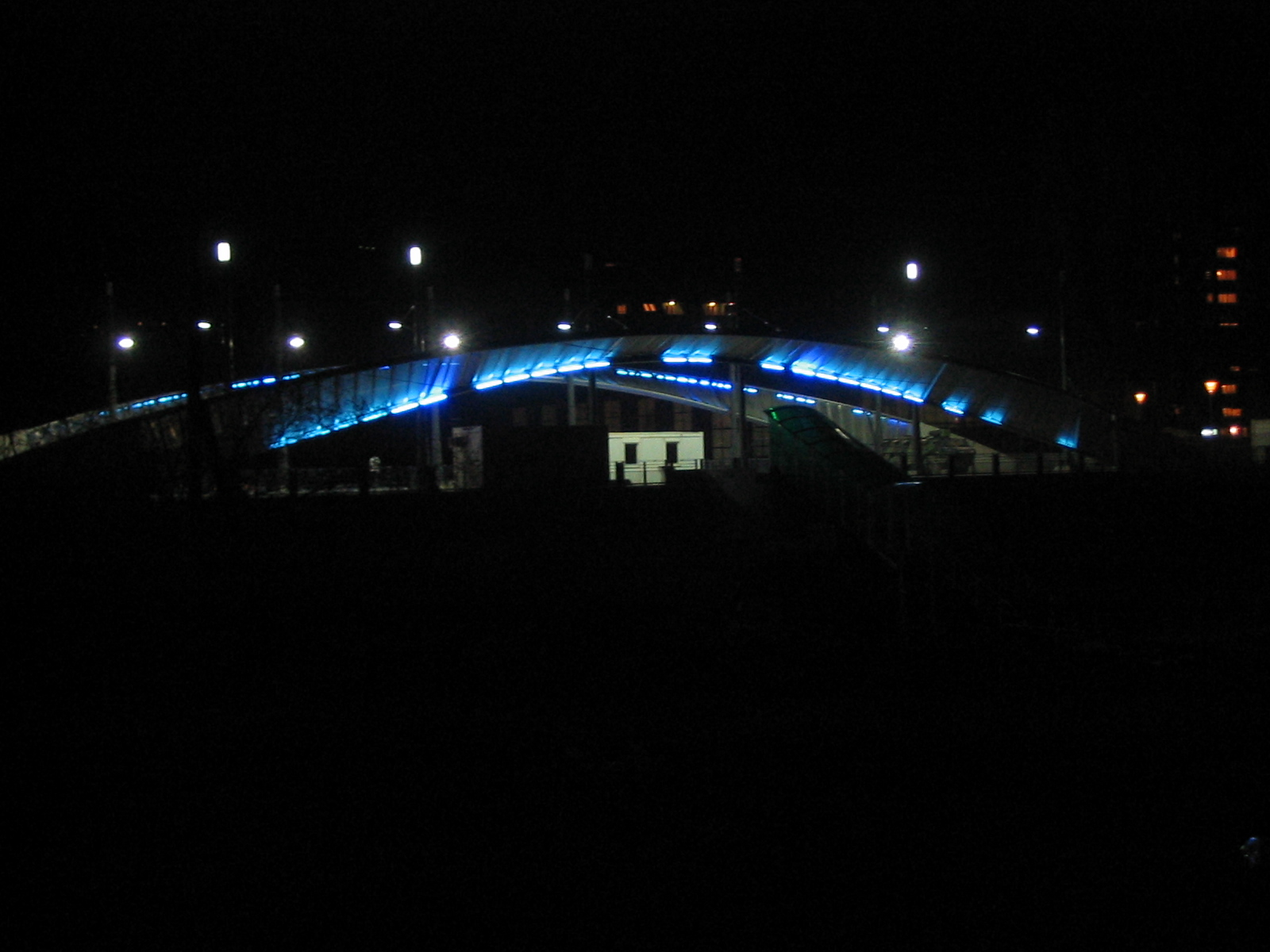 Мост на Ибру